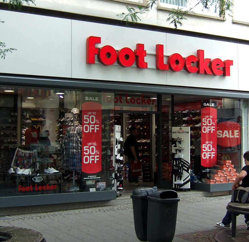 Foot Locker Geschäft in Darmstadt